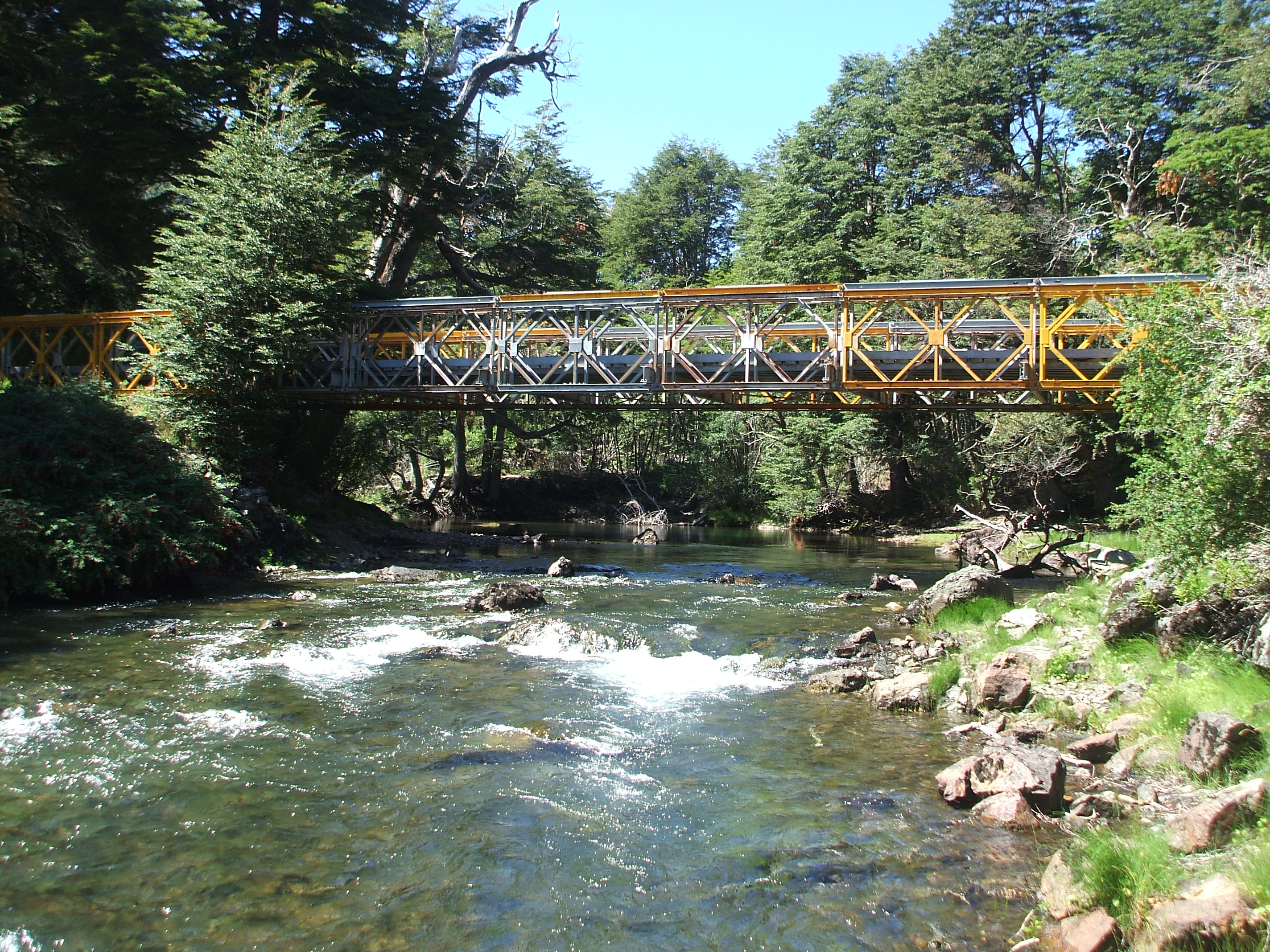 Puente de Luguna Verde